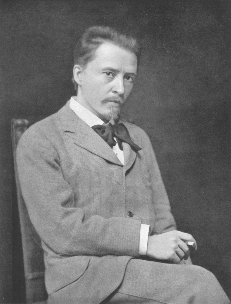 Der österreichisch-slowenische Komponist Hugo Wolf (1860-1903).